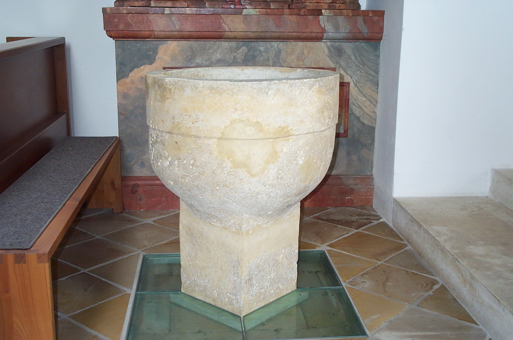 Herrngiersdorf, Semerskirchen, Am See 1. Katholische Pfarrkirche Mariä Himmelfahrt. Romanischer Taufstein aus der zweiten Hälfte des 13. Jahrhunderts. Rundes Becken auf quadratischem Ständer mit einfacher Randleiste.